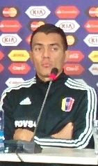 Sala de conferencias Juan Arango, Noel Sanvicente (DT) y Tomás Rincón.